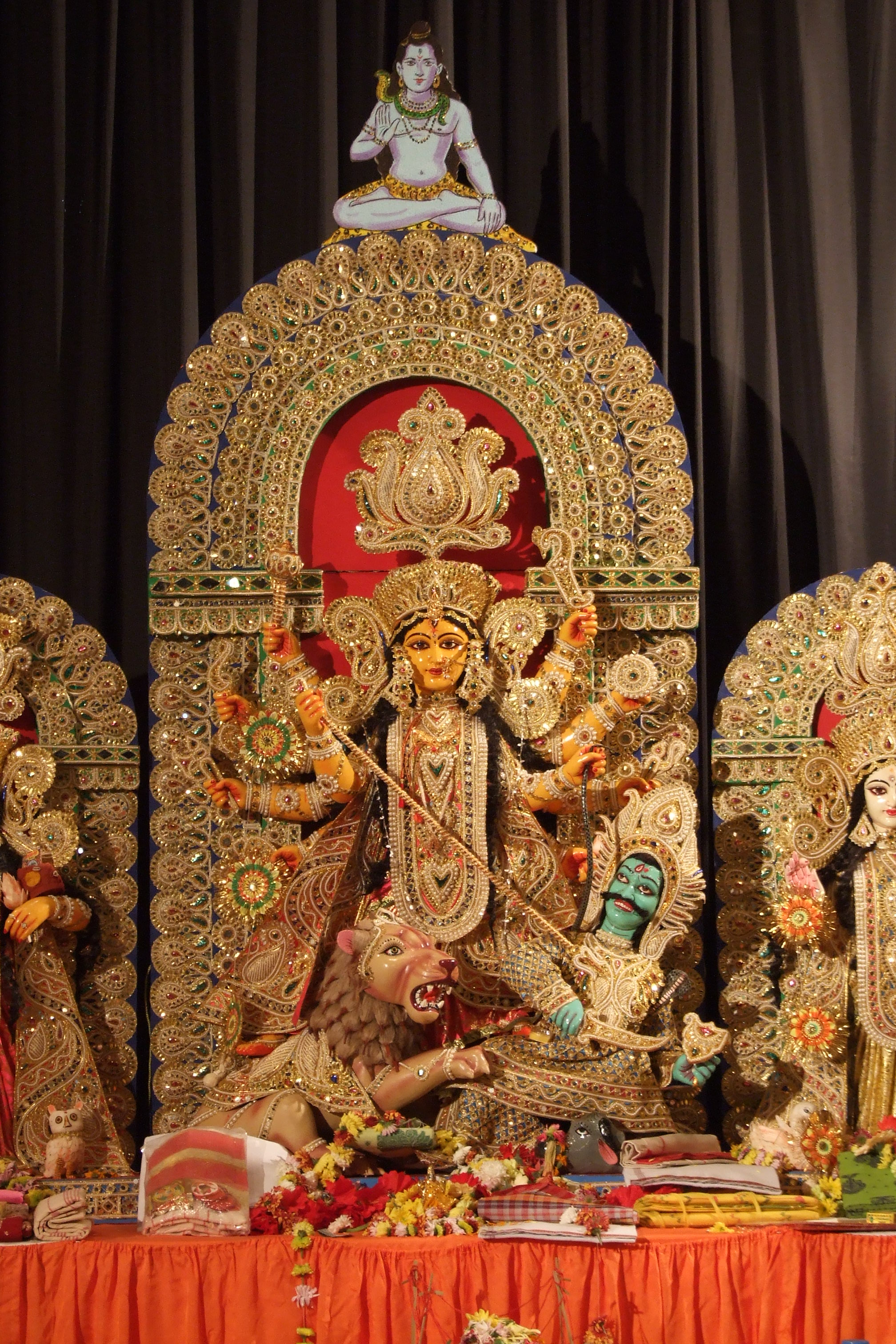 Durga Puja in Koln (Cologne), Germany